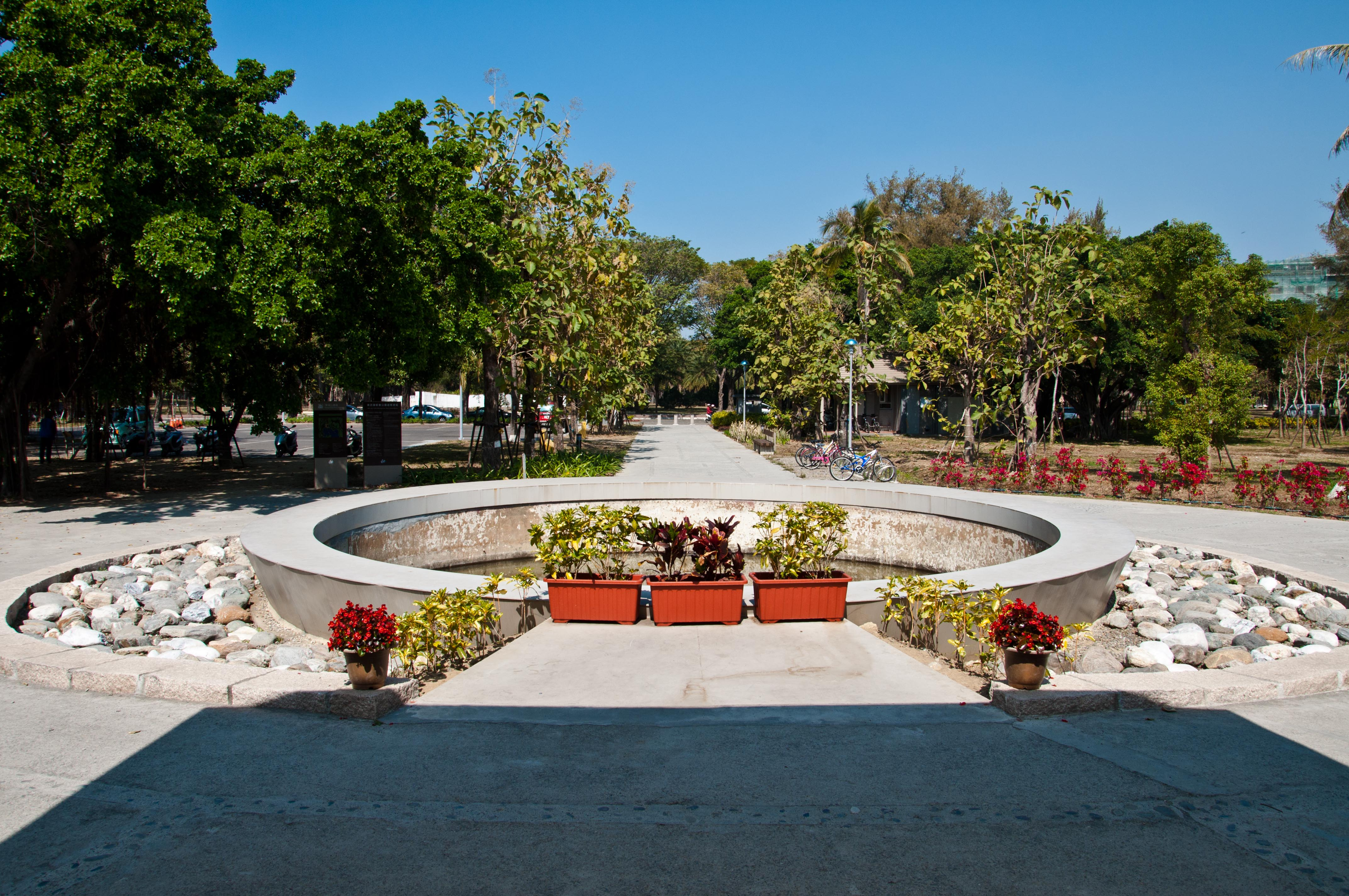 衛武營都會公園夢境公園